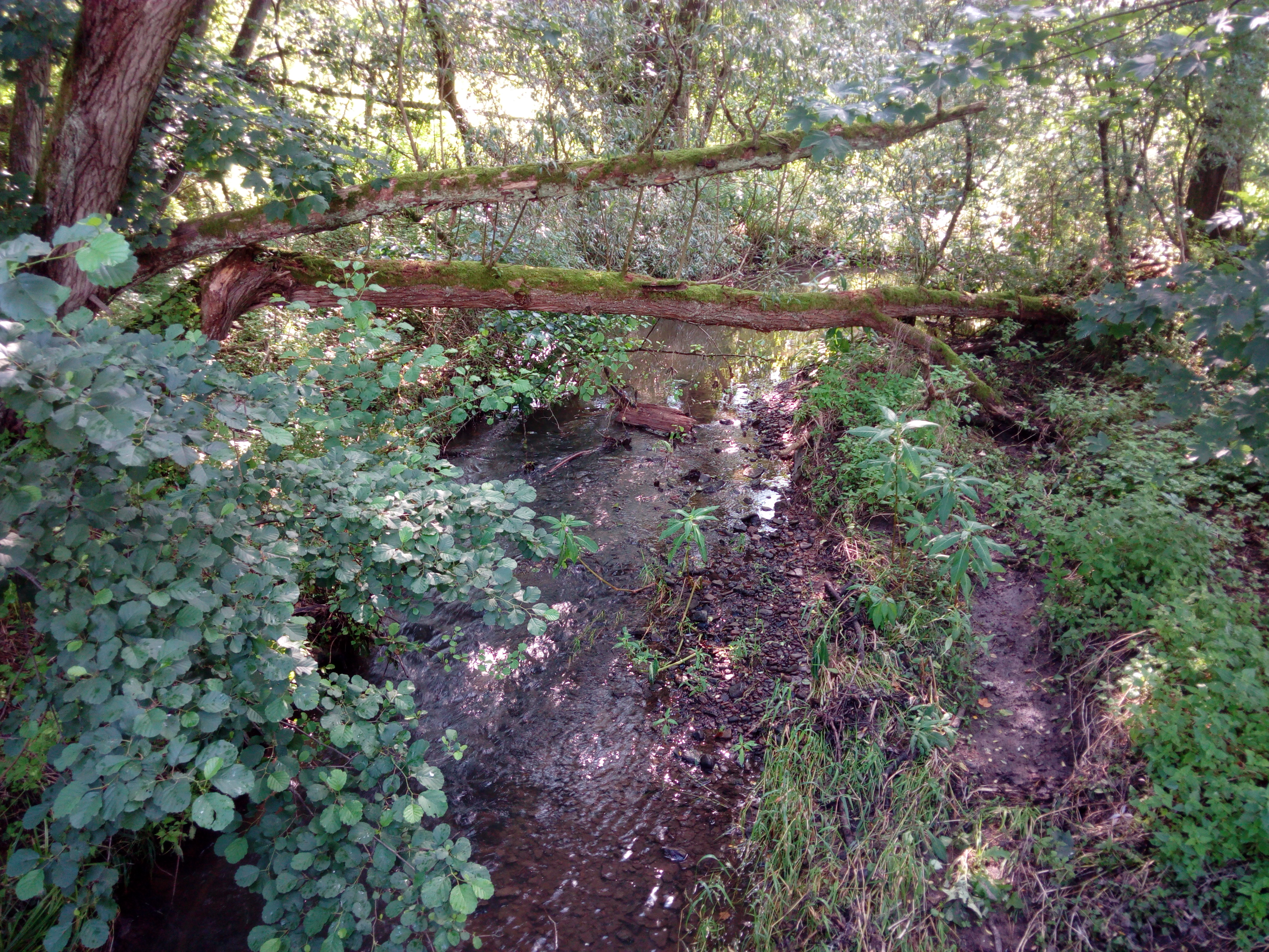 Bleichenbach zwischen Ortenberg Bergheim und Ortenberg Bleichenbach